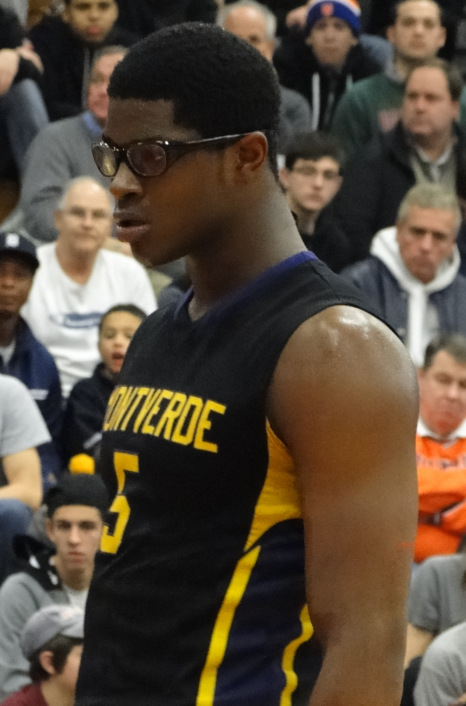 Devin Williams